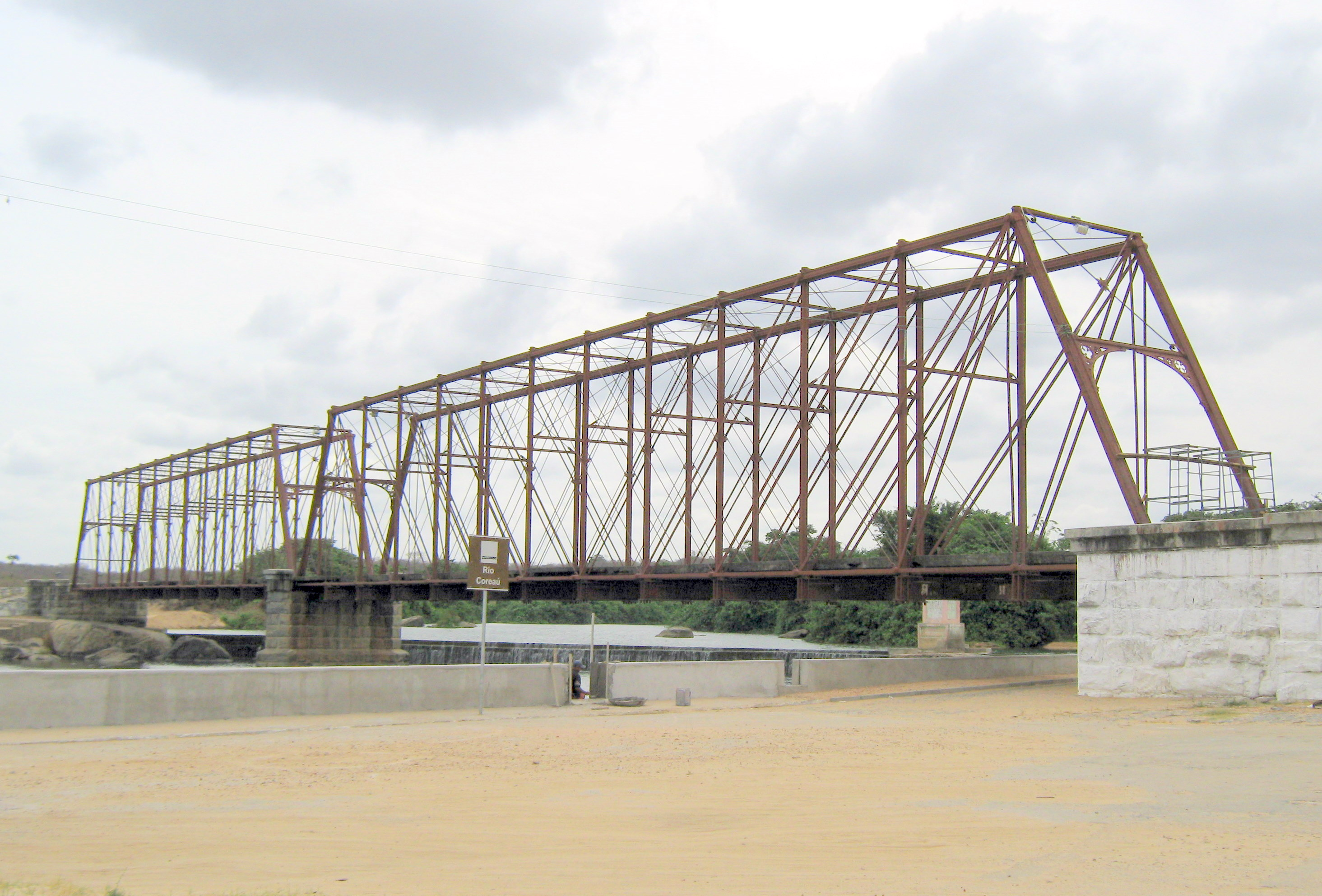 Ponte ferroviária de Granja sobre o Rio Coreaú